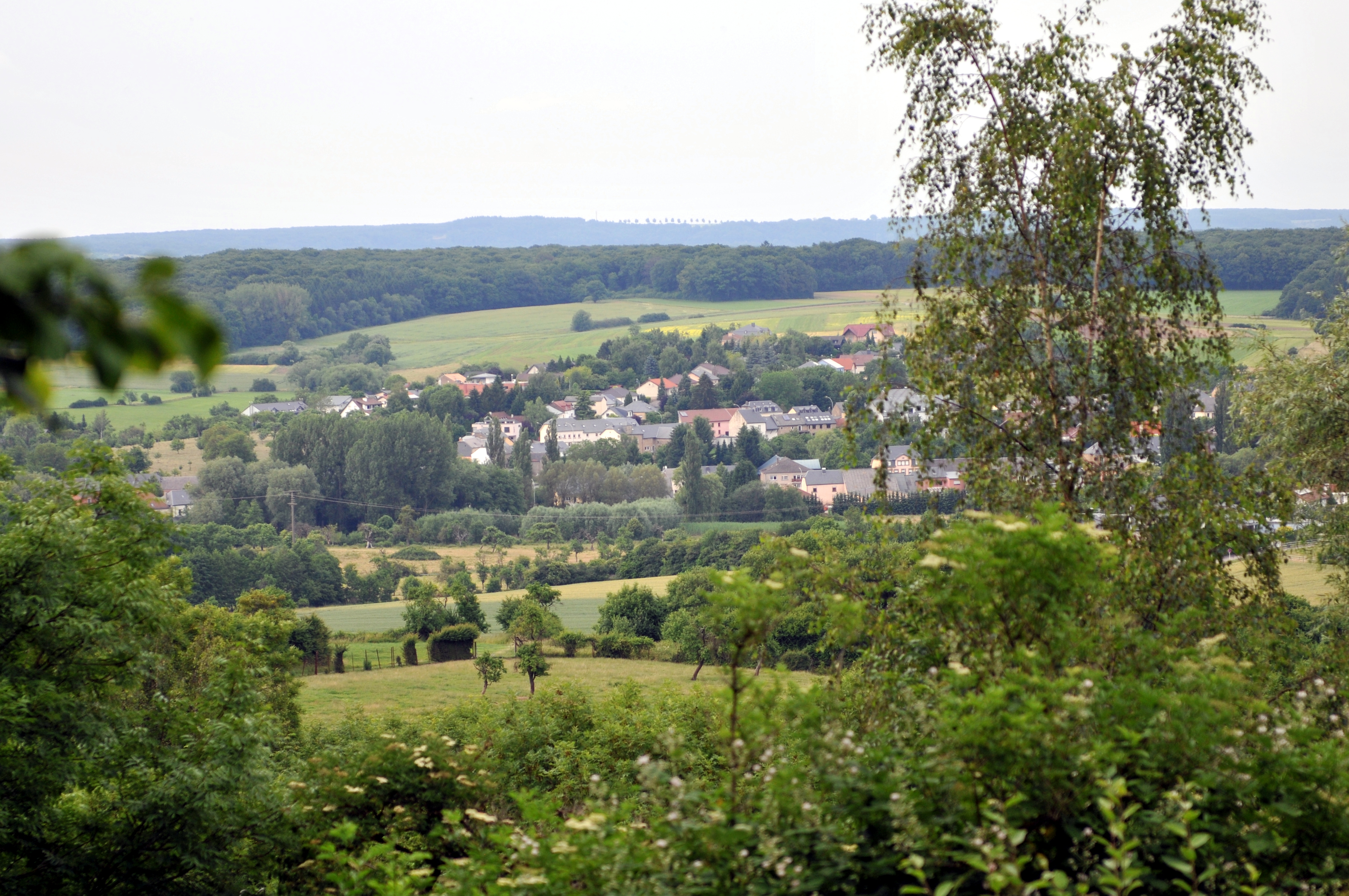 Vue vum Bloëbierg op Nidderaanwen.